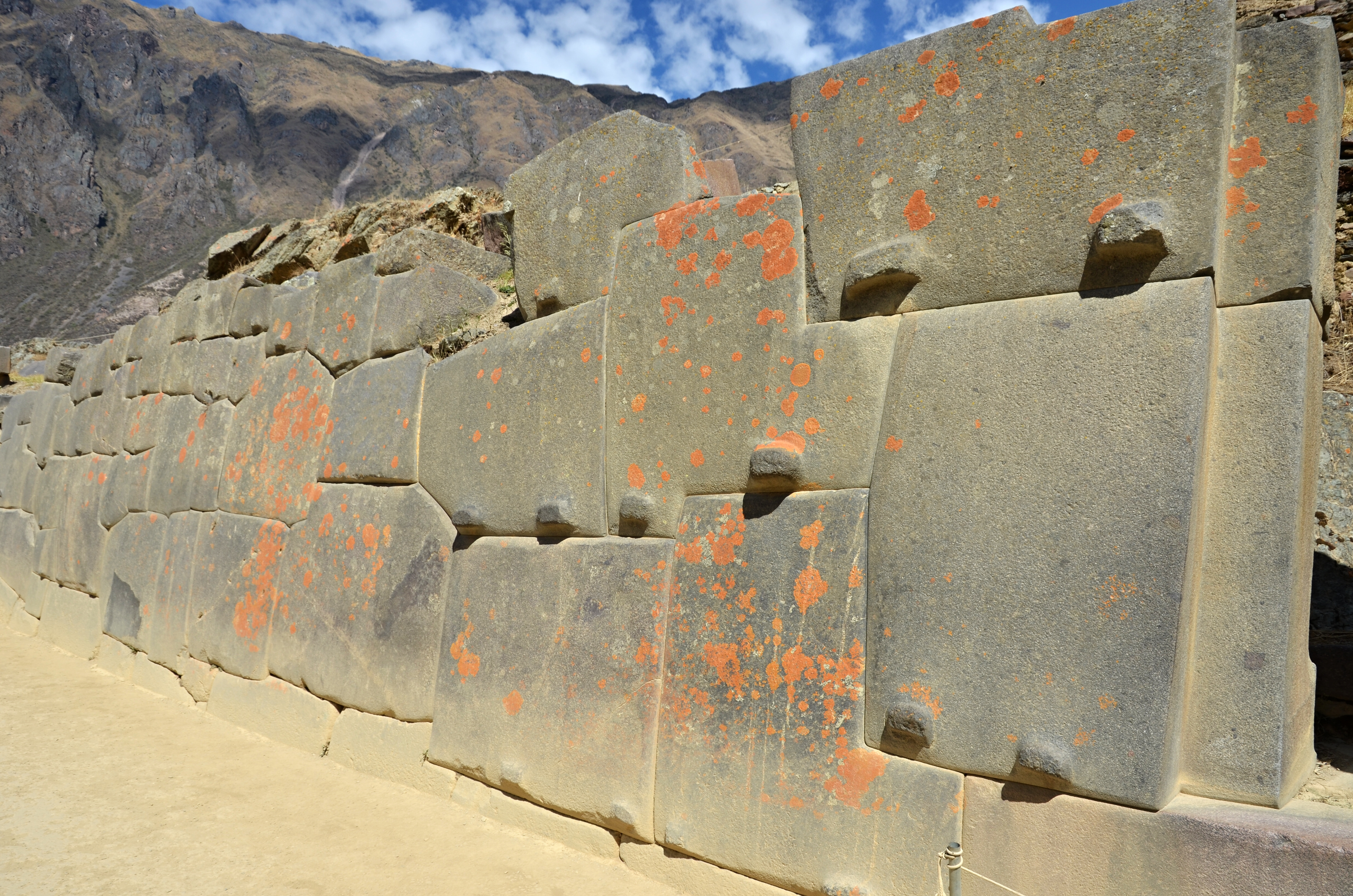 Ollantaytambo